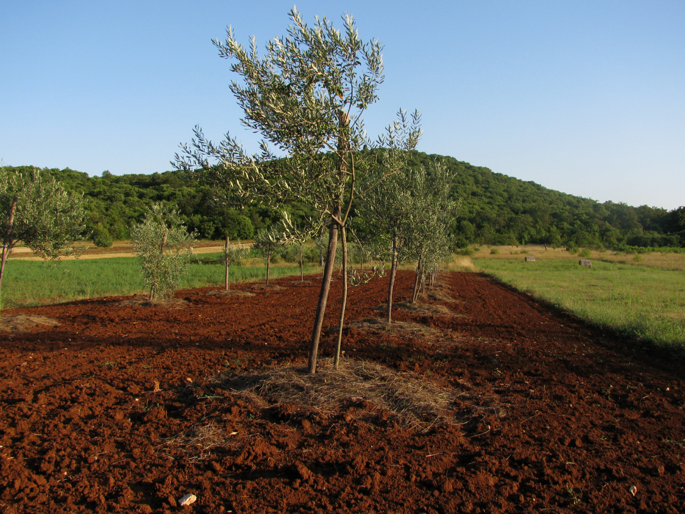 Terra Rossa (Roterdeboden) im kroatischen Istrien